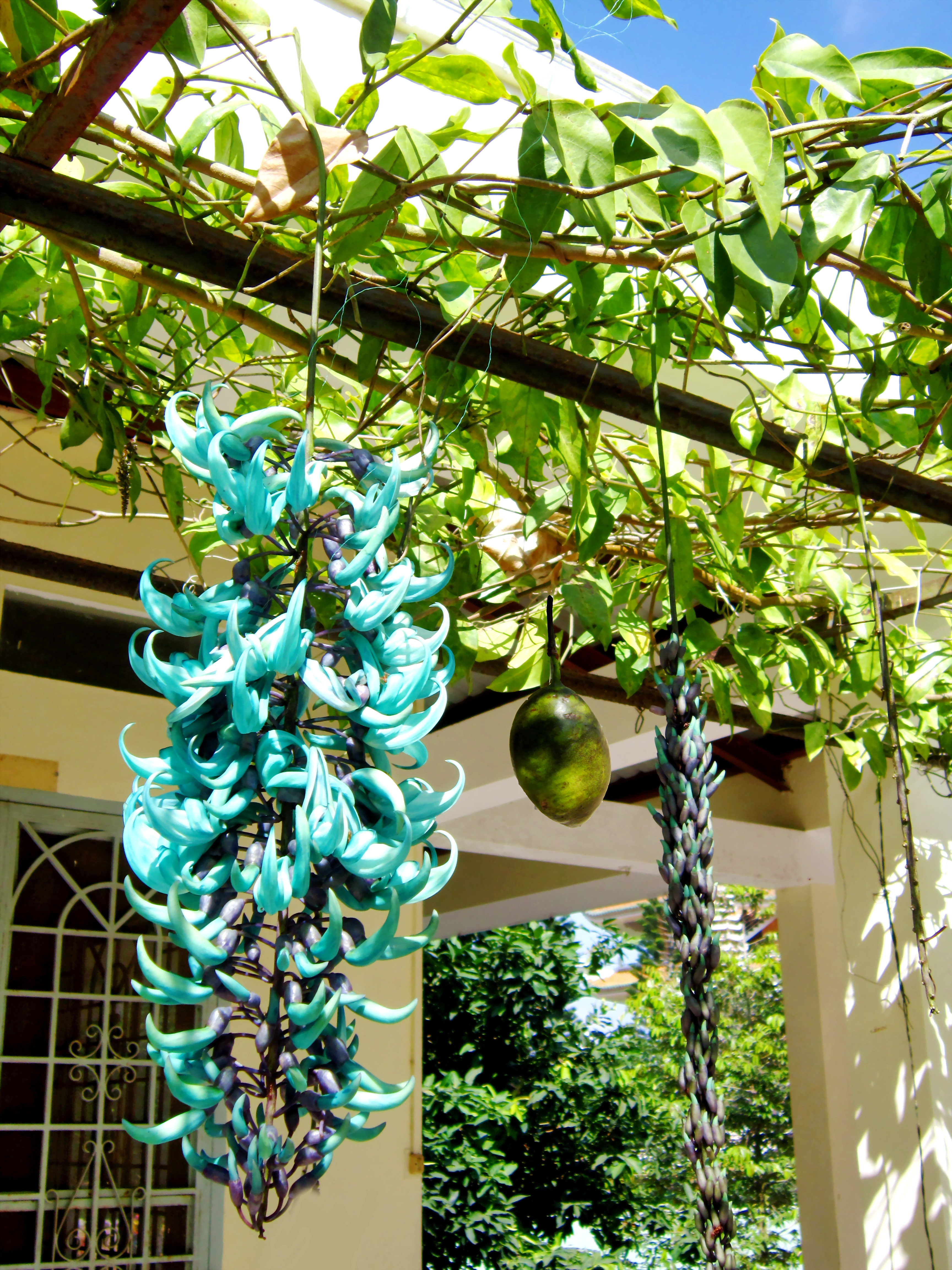 Hoa móng cọp xanh. Ảnh chụp trong khuôn viên chùa Vạn Linh trên đỉnh núi Cấm, An Giang, Việt Nam.